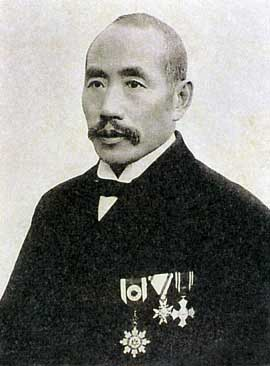 关西财阀吴锦堂先生